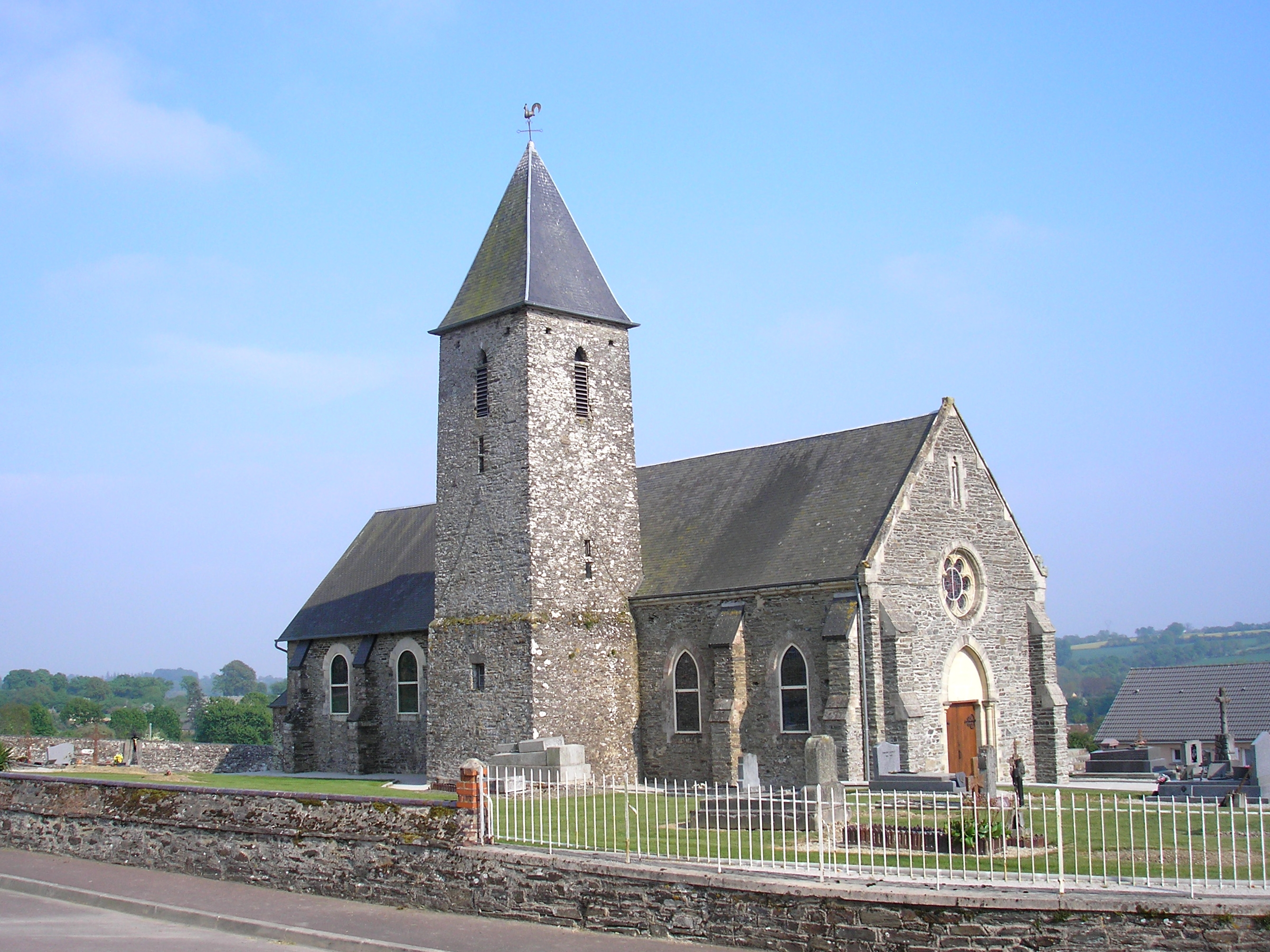 Précorbin (Normandie, France). L'église Saint-Aubin.